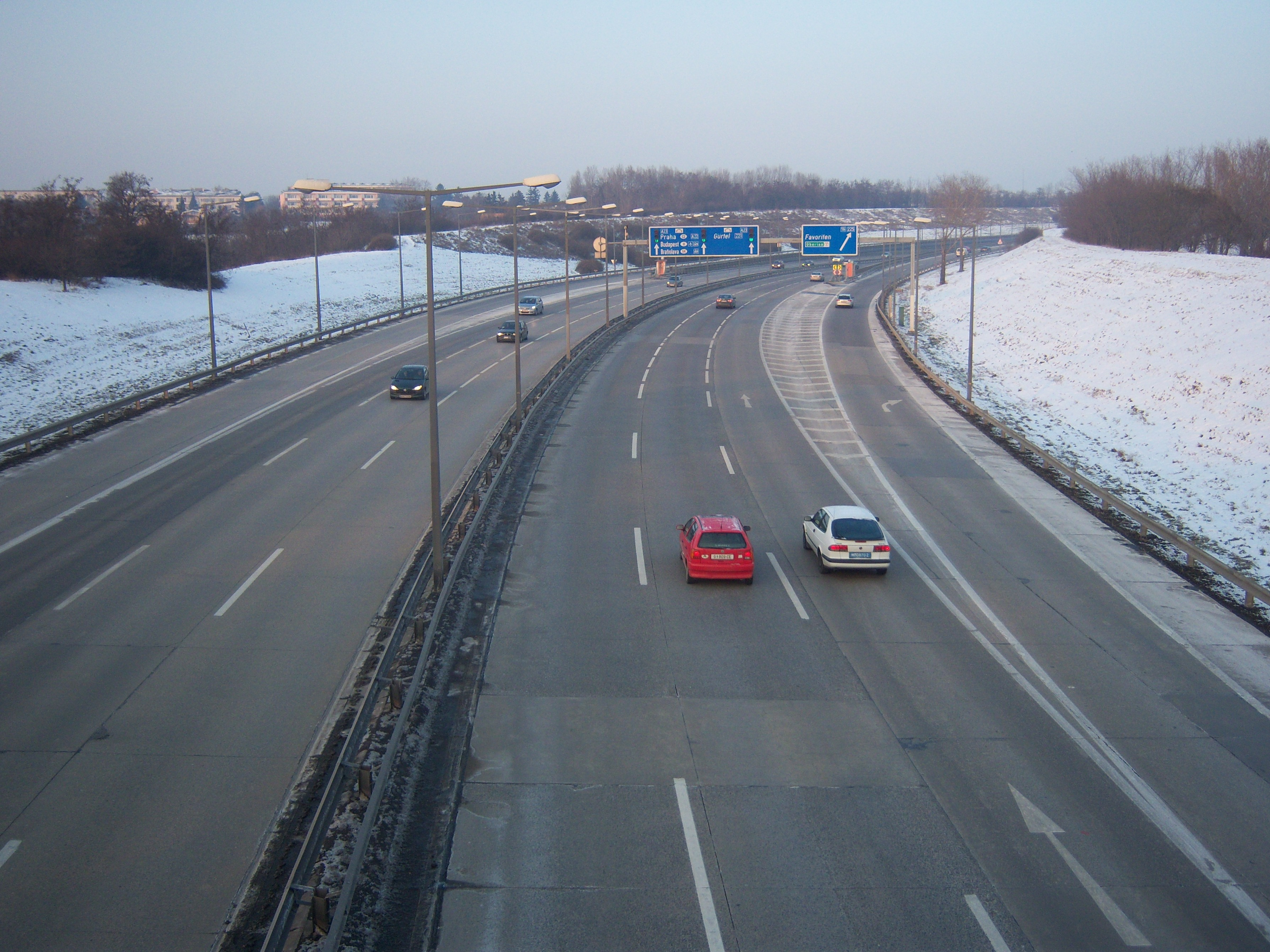 Autobahn Südosttangente Wien A23 Richtung Norden vor der Anschlussstelle Favoriten